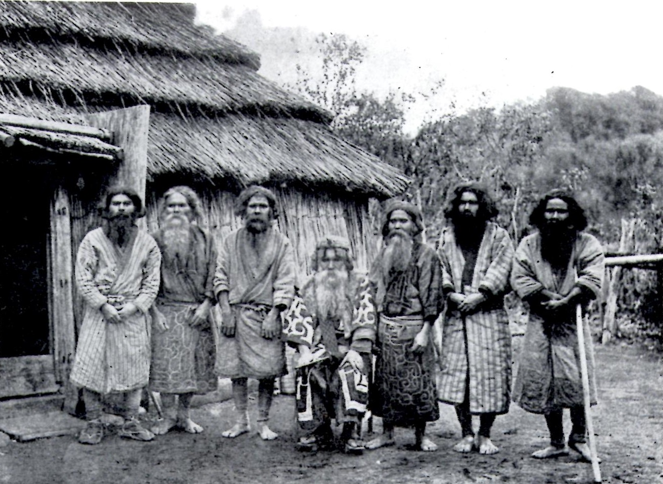 金田一京助『アイヌ文學』（昭和8年）扉絵より